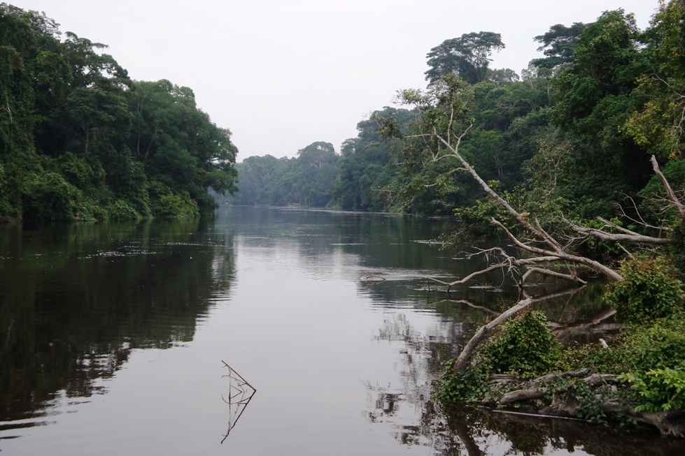 Image prise lors d'une traversée de la rivière Dja pour mener une patrouille dans la reserve de biosphère du Dja .